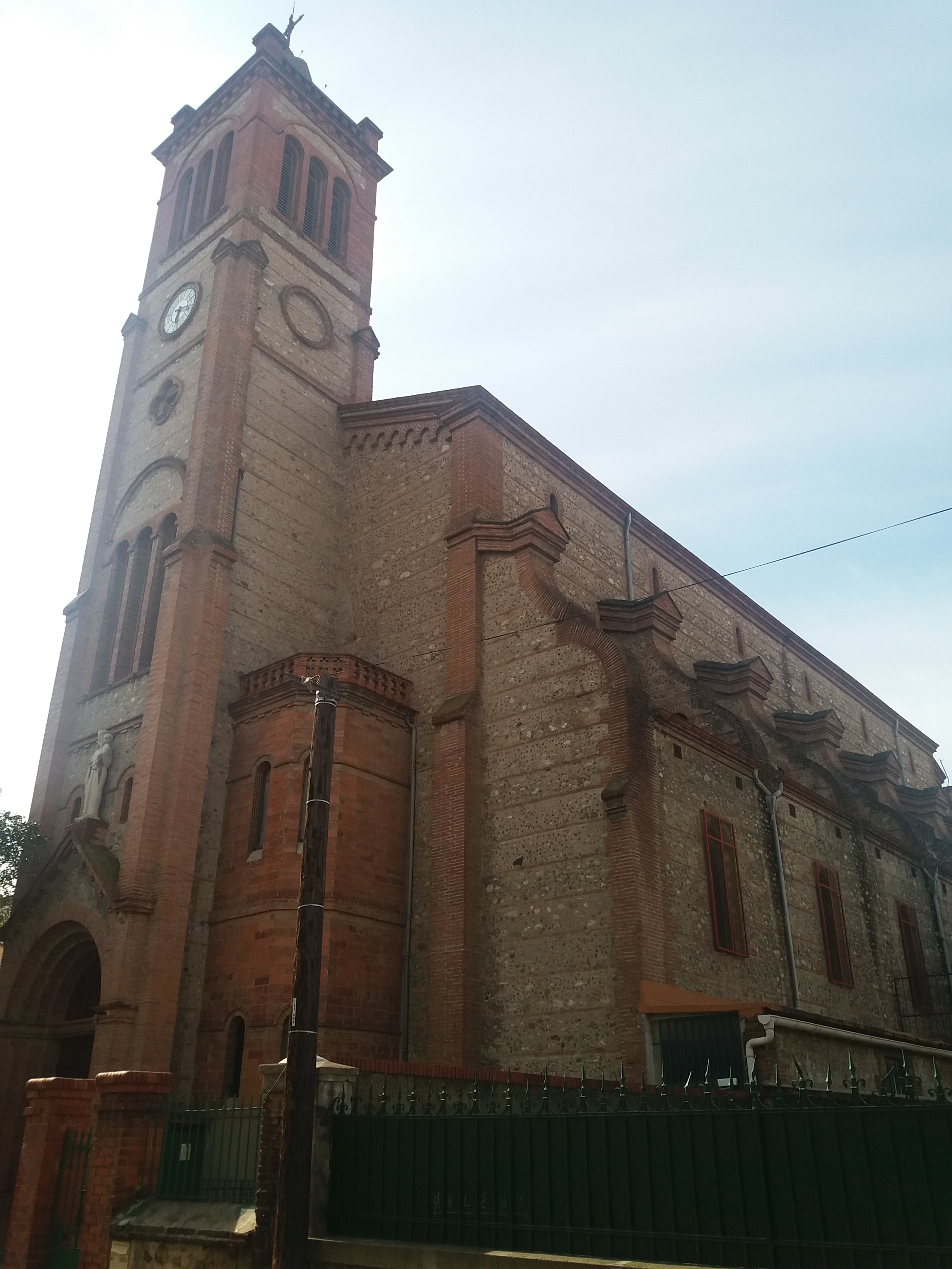 L'església de Sant Josep de Perpinyà